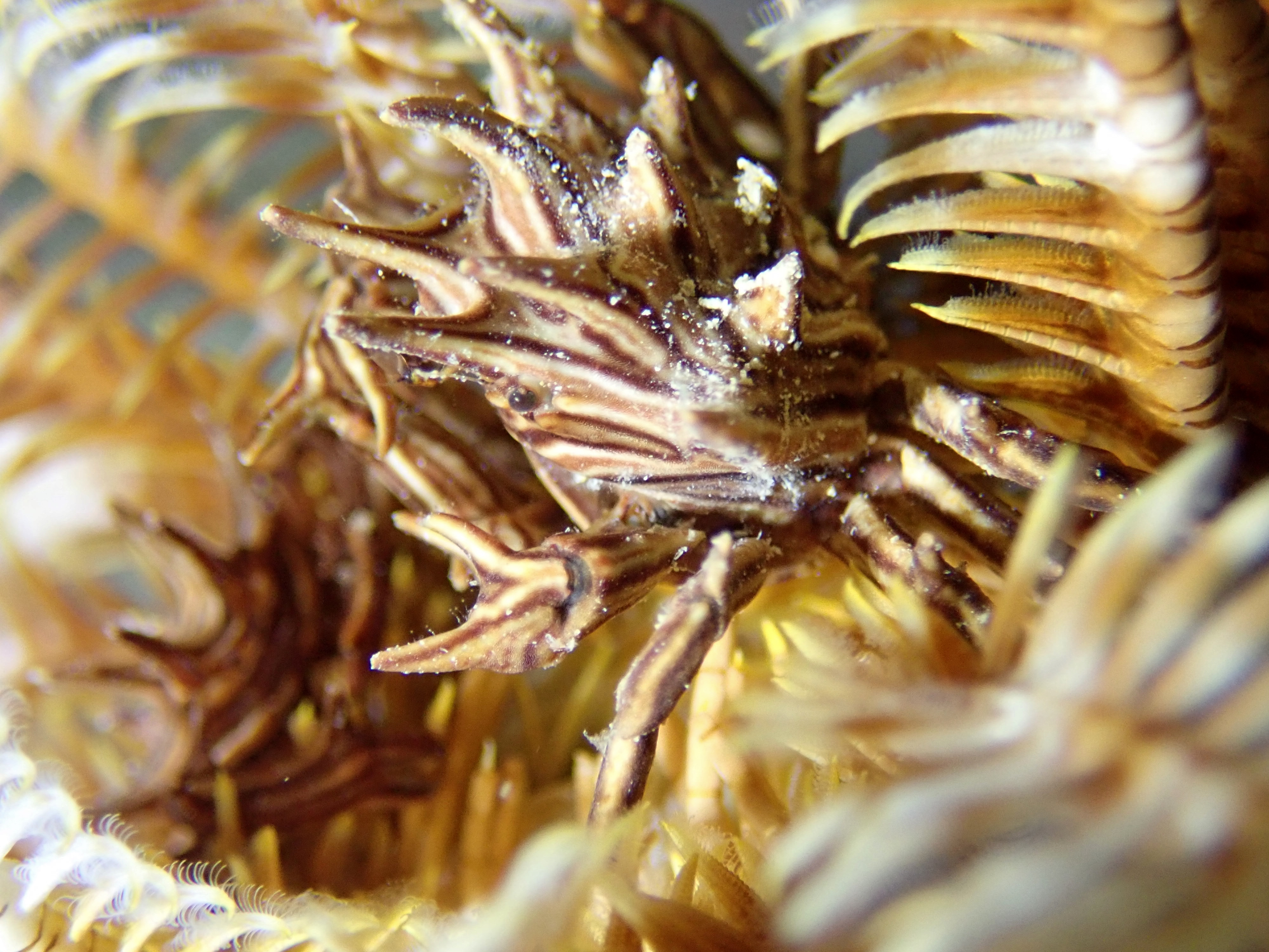 Un crabe symbiotique Tiaramedon spinosum dans un crinoïde à Mayotte.